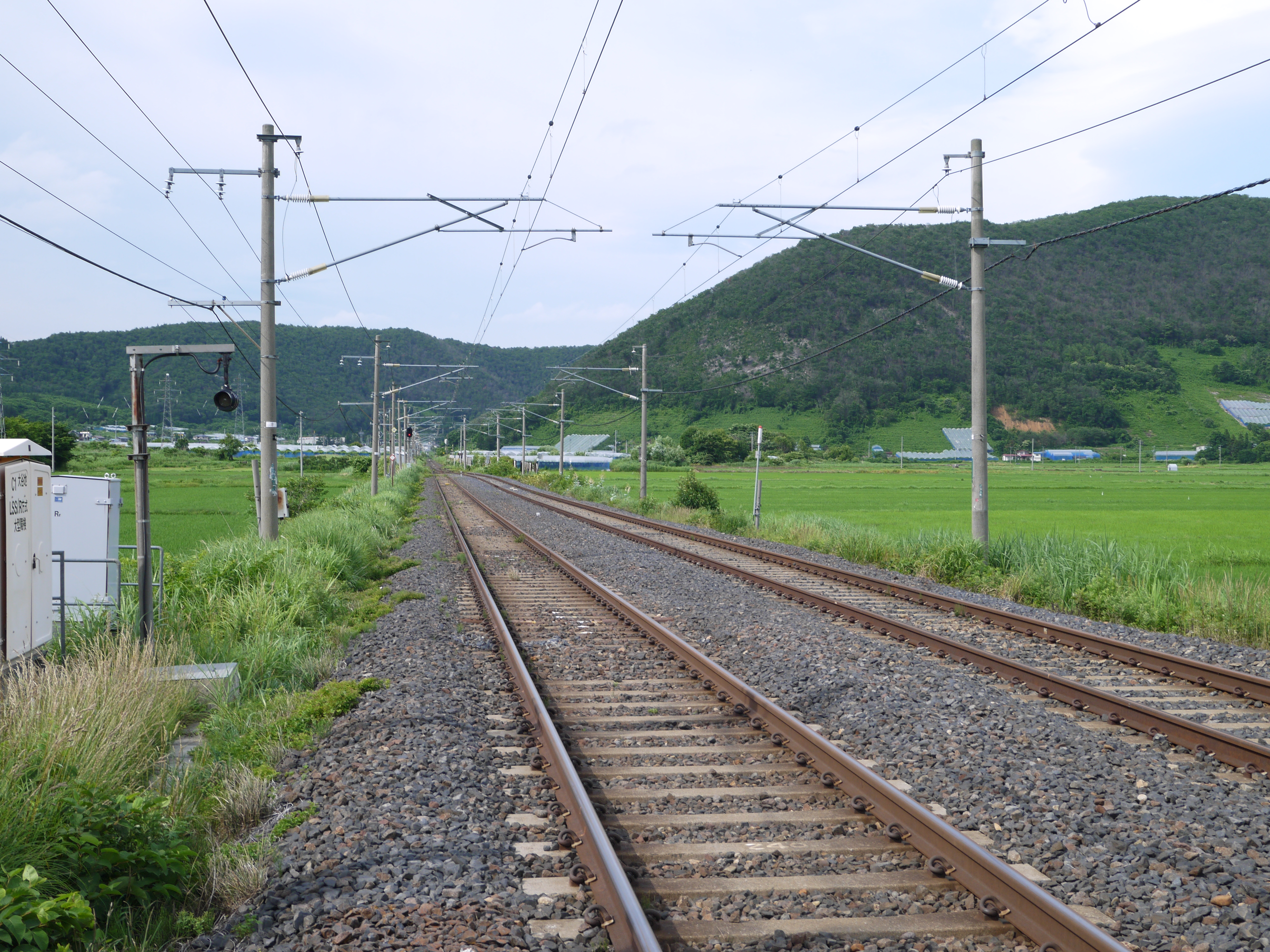 奥羽本線（山形線） 北赤湯信号場 （福島側から撮影）